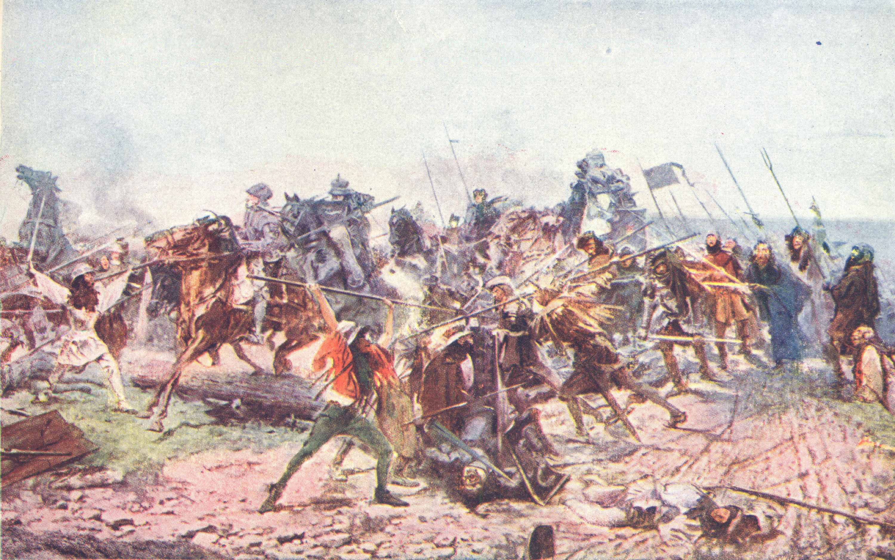 Bitva u Lipan: Útok panské jízdy. Výjev z Maroldova panoramatu bitvy u Lipan, jež bylo pořízeno pro Výstavu architektury a inženýrství, která se konala na Výstavišti v Praze Holešovicích v roce 1898.